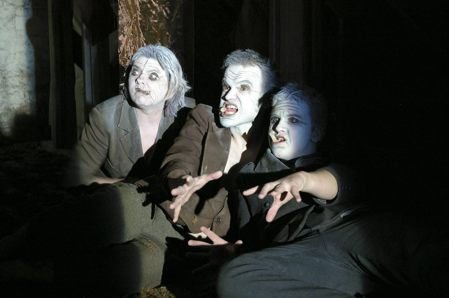 Juhan Jaik/Jan Rahman "Painaja" (2006) Väimela mõisa viljaaidas. Lavastaja Tarmo Tagamets, kunstnik Mihkel Ehala, muusikaline kujundus Kristjan Priks ja Peeter Pai. Fotol vasakult Heli Teidla, Mart Usin ja Kait Kall.